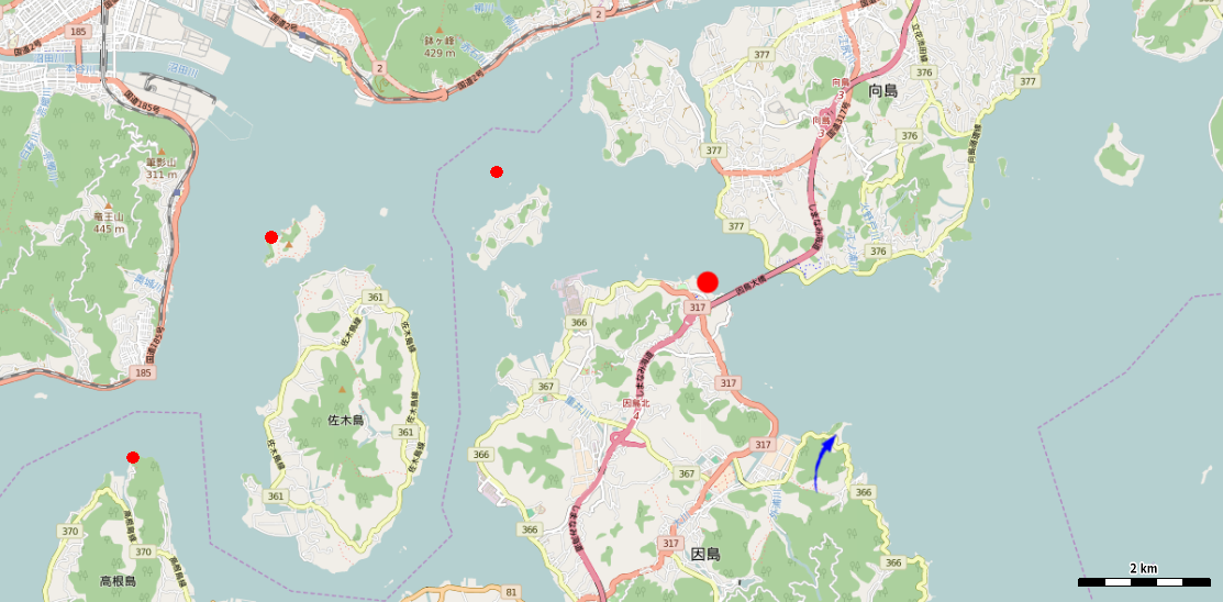 2016年の大浜崎灯台の周辺地図 This map may be incomplete, and may contain errors. Don't rely solely on it for navigation.